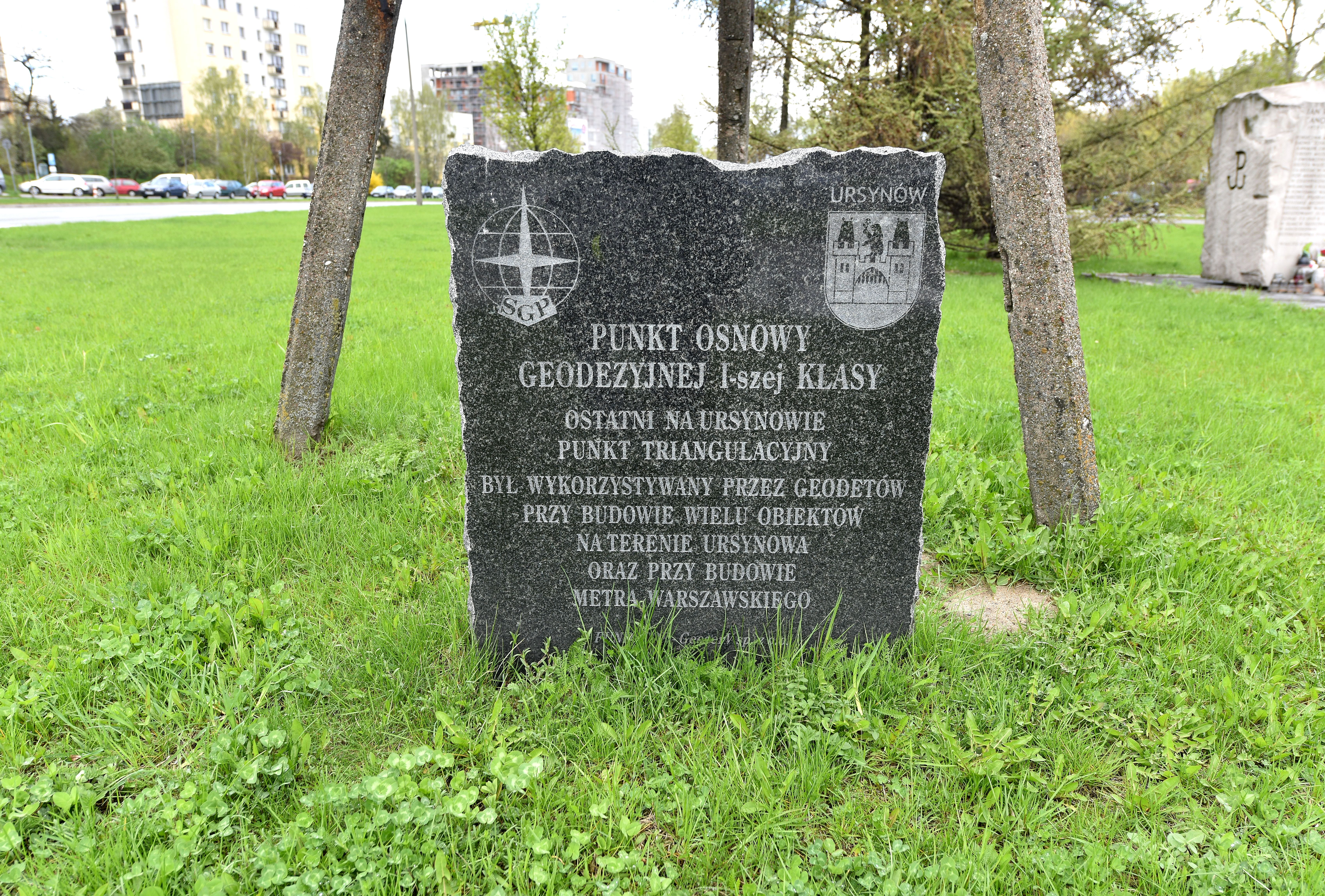 Upamiętnienie punktu triangulacyjnego w al. jana Rodowicza "Anody" (przy skrzyżowaniu z ul. Ciszewskiego) w Warszawie